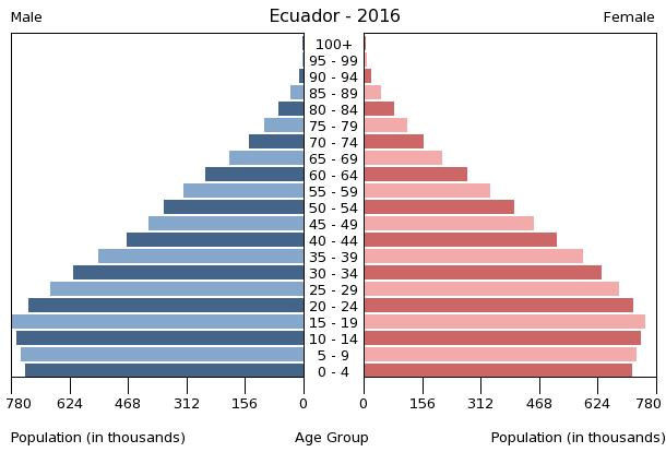 A population pyramid illustrates the age and sex structure of a country's population and may provide insights about political and social stability, as well as economic development. The population is distributed along the horizontal axis, with males shown on the left and females on the right. The male and female populations are broken down into 5-year age groups represented as horizontal bars along the vertical axis, with the youngest age groups at the bottom and the oldest at the top. The shape of the population pyramid gradually evolves over time based on fertility, mortality, and international migration trends.